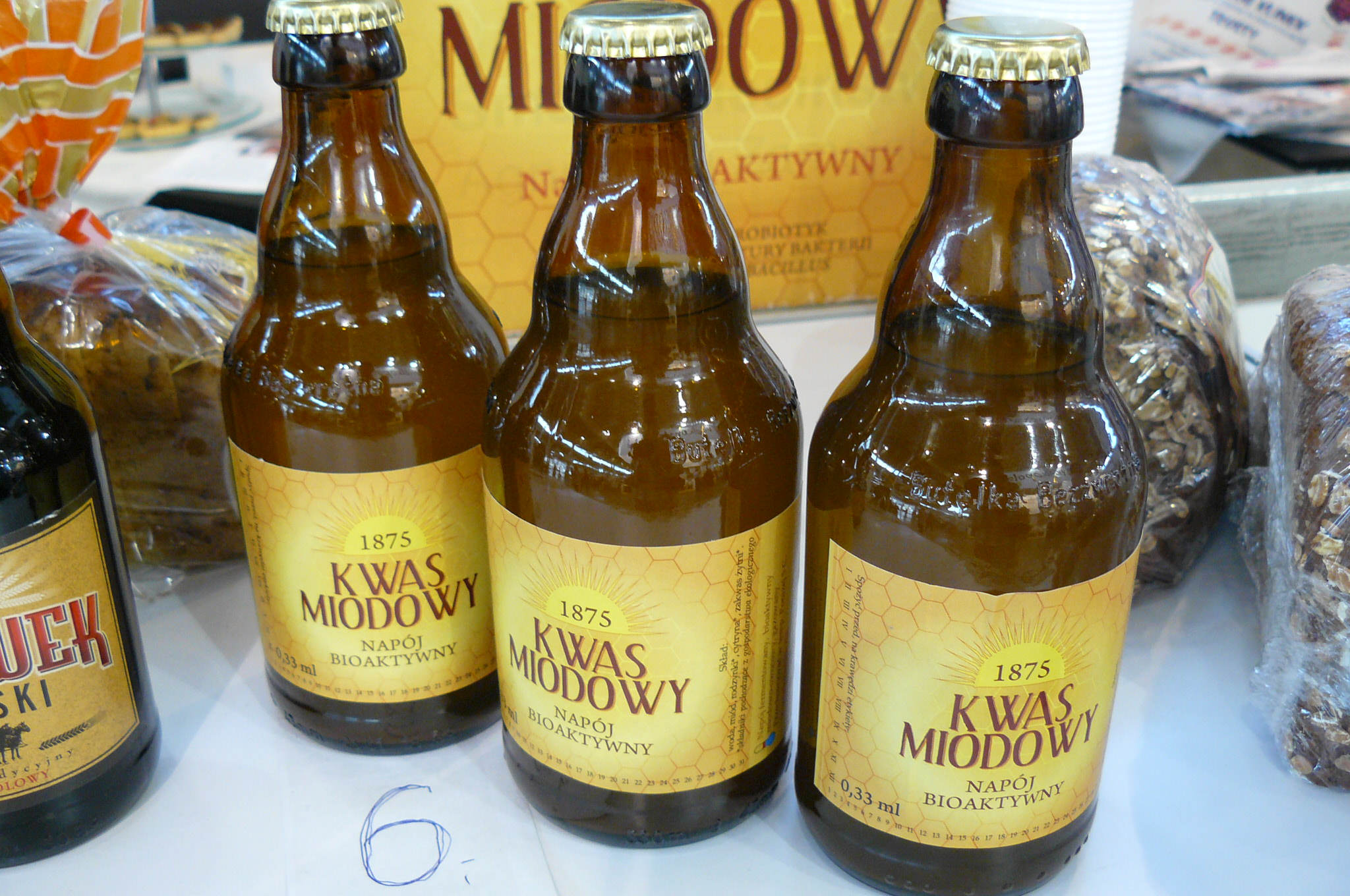 Kwas miodowy na Smakach Regionów - Poznań, 2015r.